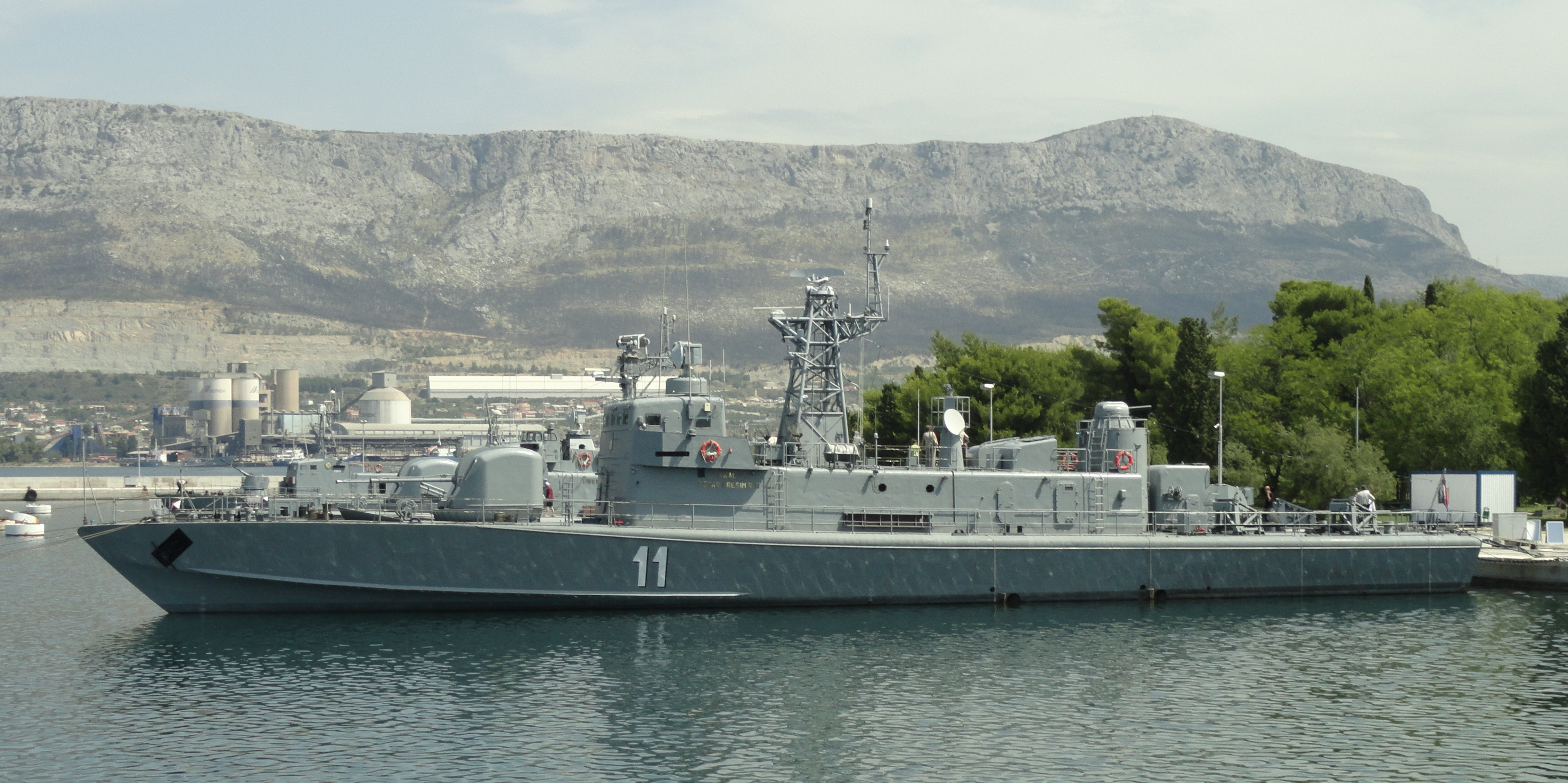 RTOP-11 Kralj Petar Krešimir IV. u Lori.